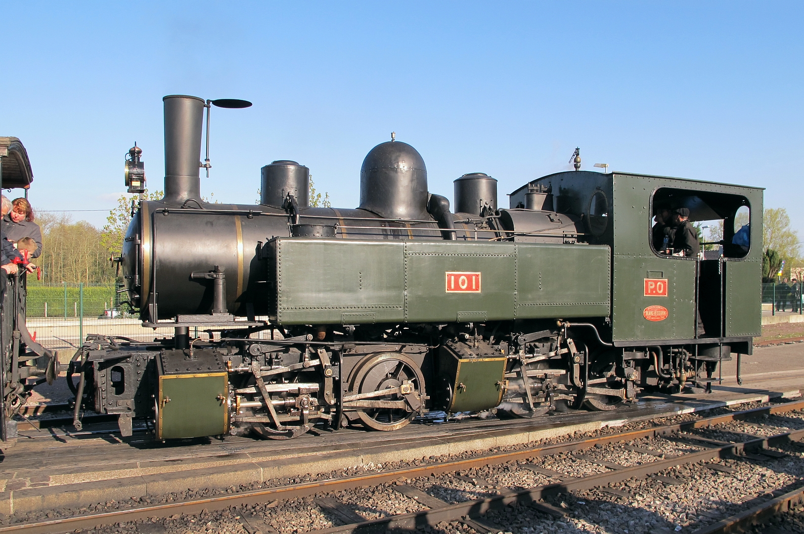 La locomotive Mallet n°101 POC des voies ferrées du Velay, en déplacement sur le chemin de fer de la baie de Somme pour la fête de la vapeur le 28 avril 2013.